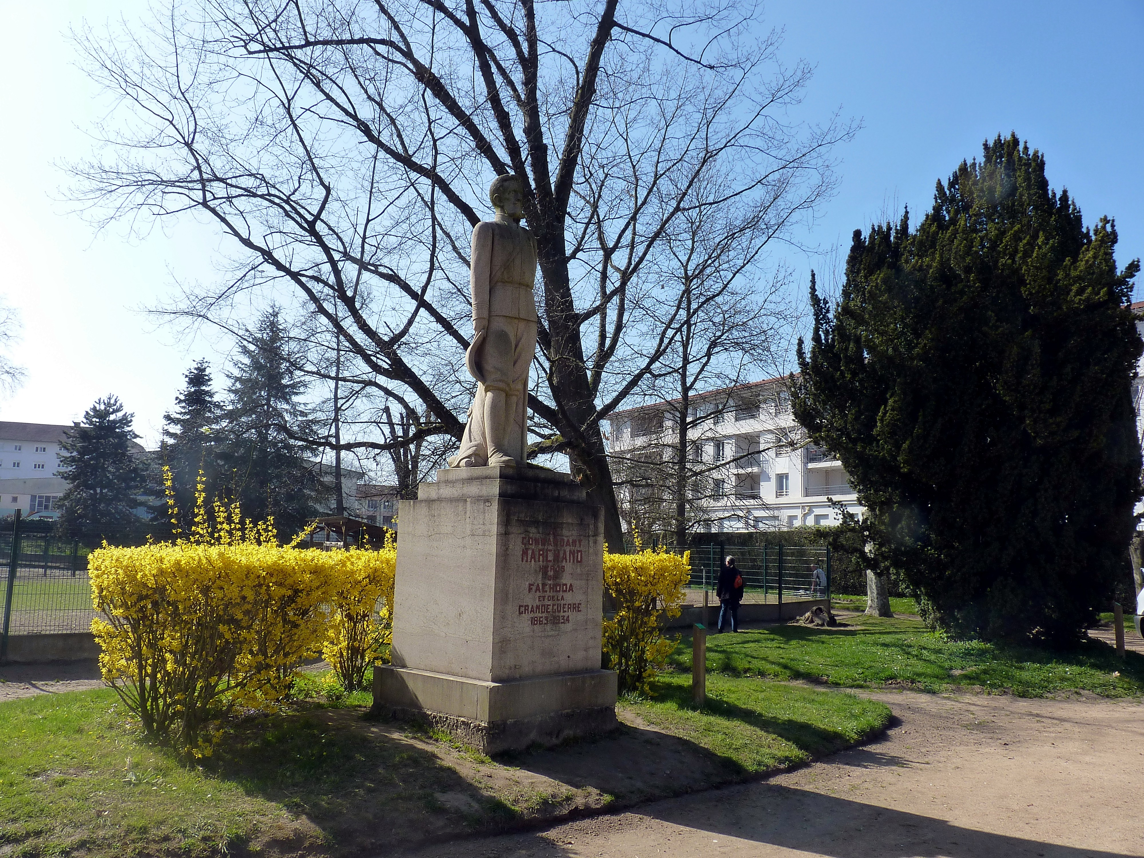 Ville de Thoissey dans l'Ain ; Monument du Commandant Marchand, héros de Fachoda et de la Grande Guerre, né à Thoissey.